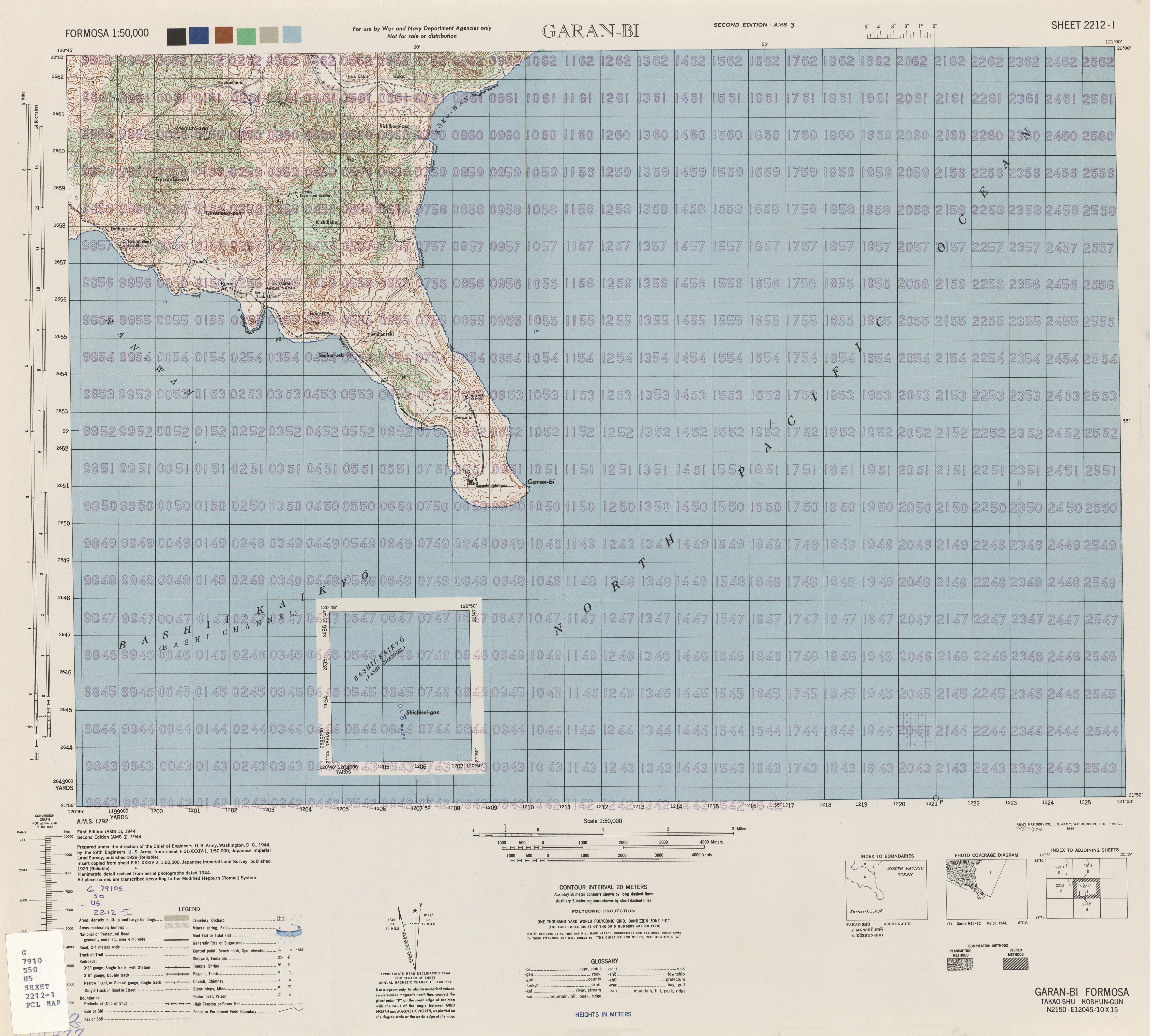 Series L792